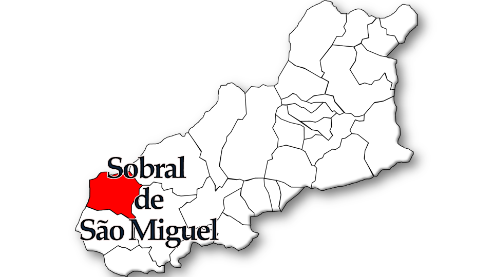 População